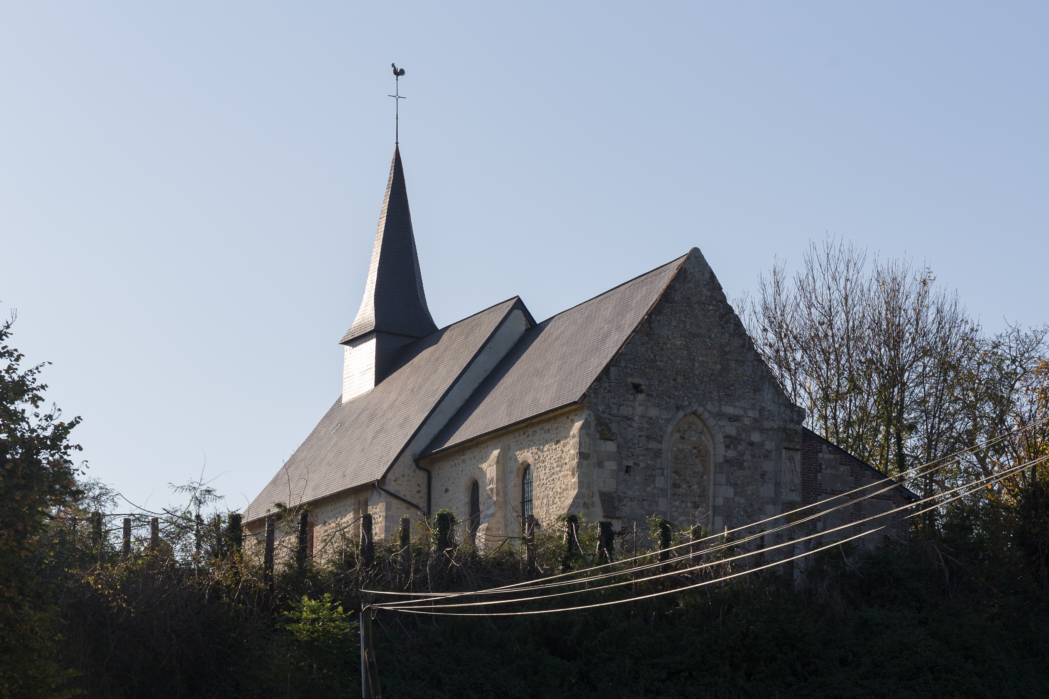 Église Saint-Taurin d'Englesqueville-en-Auge